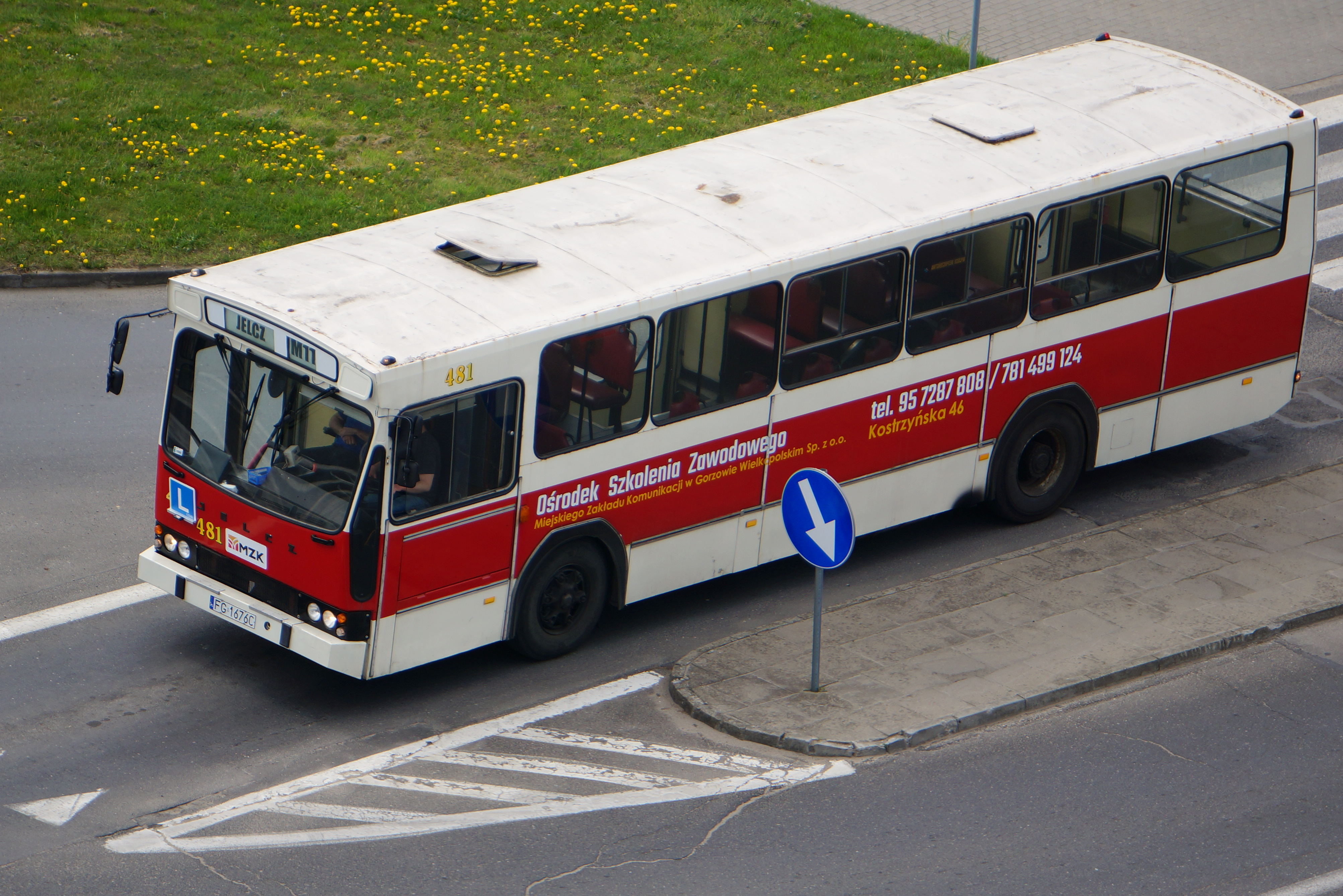 Jelcz M11 ( # 481 ), historyczny autobus eksploatowany w gorzowskim MZK jako pojazd nauki jazdy.